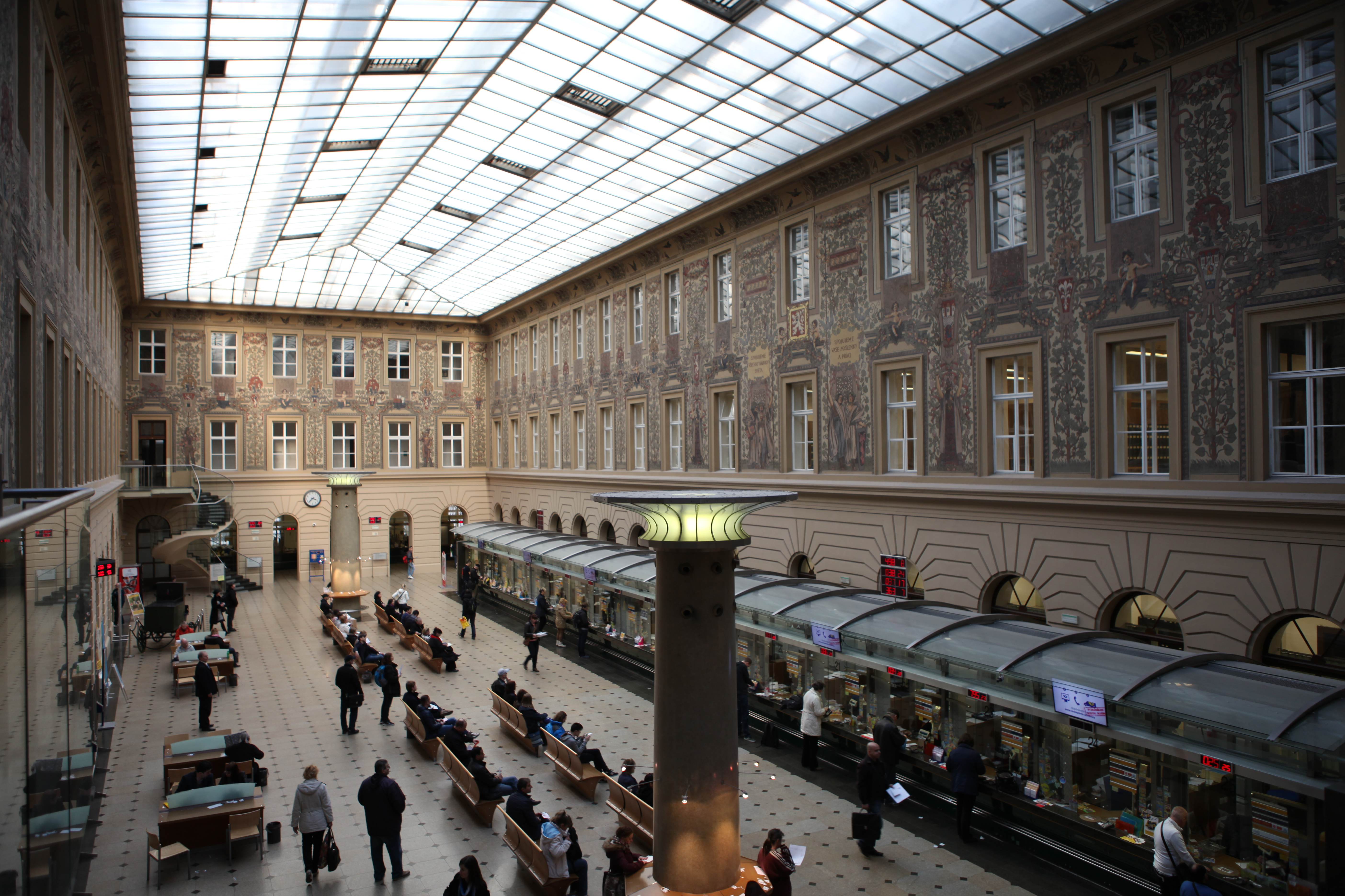 Interiér sídla České pošty v Jindřišské ulici v Praze.